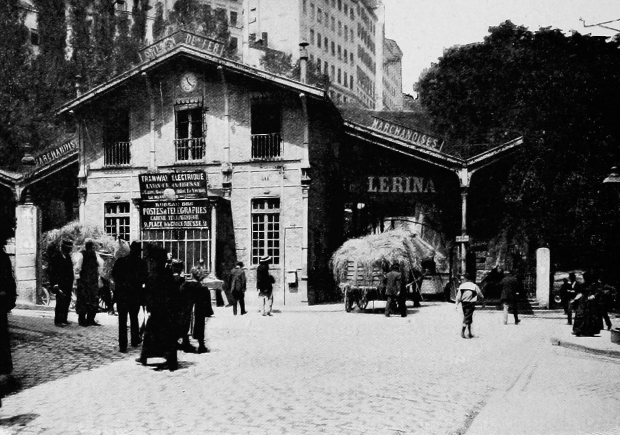 Dictionnaire illustré des communes du département du Rhône. Tome 2 / par MM. E. de Rolland et D. Clouzet.